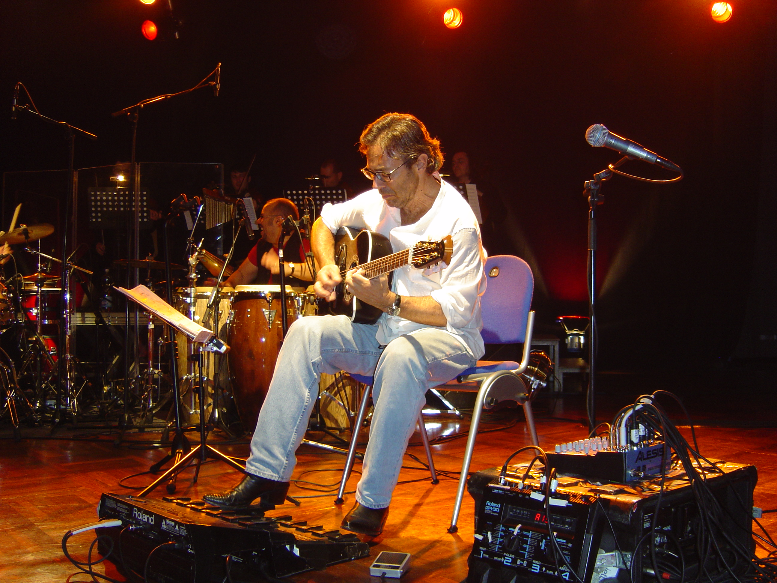 Al di Meola, Germany 2004